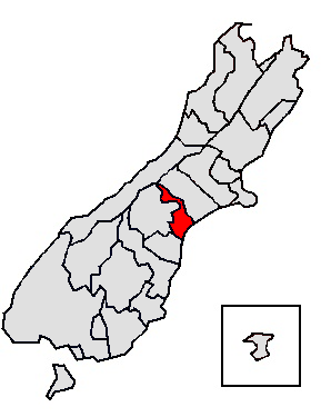 Die Karte zeigt das Timaru District Council rot selbt erstellt